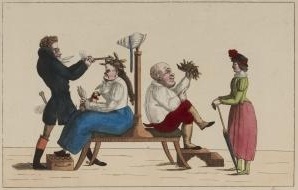 „Monsieur Frison, ou le Coiffeur à la mode“ (Herr Frison oder der Modefriseur), Lithographie nach einer Zeichnung von Unbekannt, Musée Carnavalet, Histoire de Paris, Numéro d’inventaire: G.35188, [1].